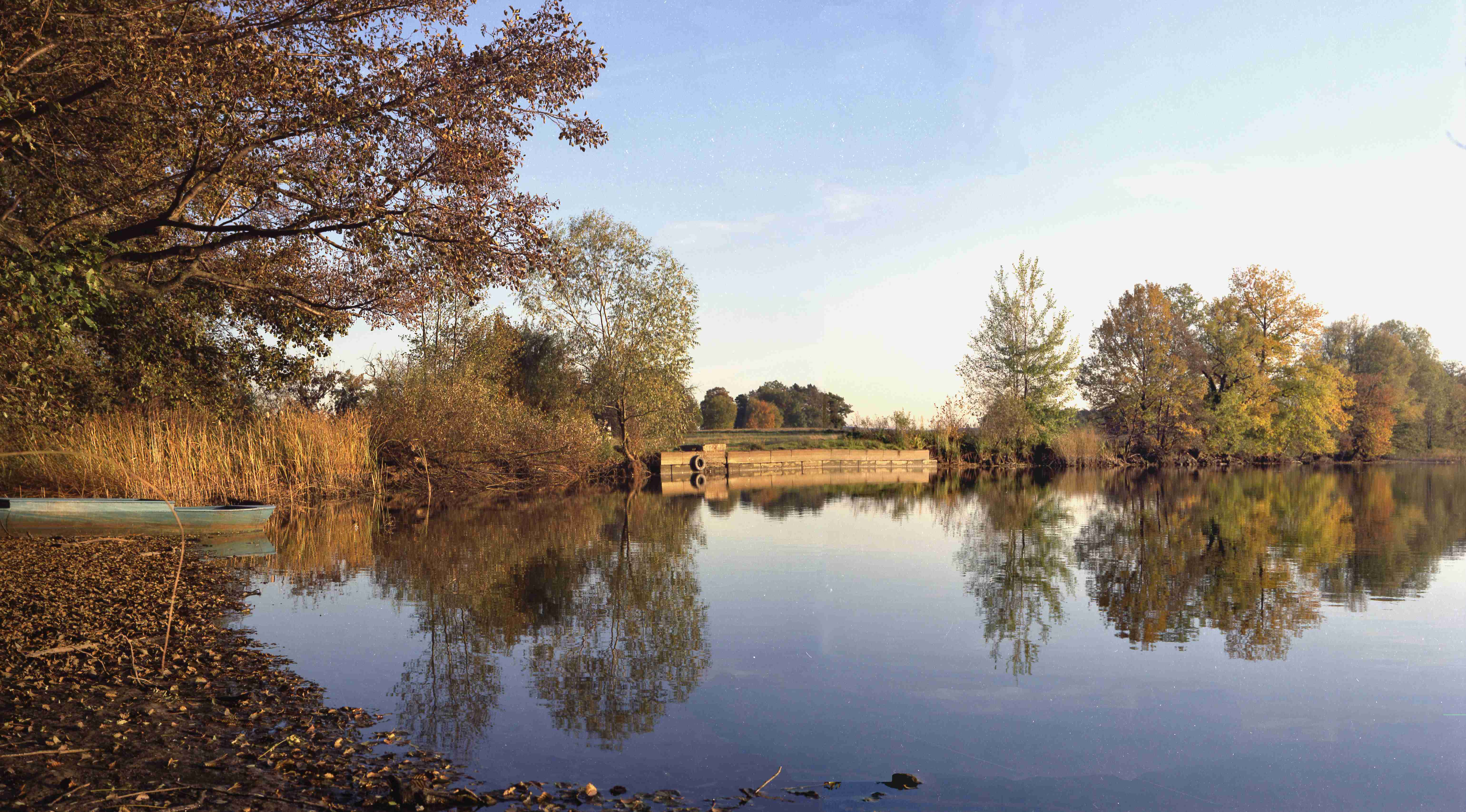 Herbststimmung am Großteich. Foto: Rainer Kamenz